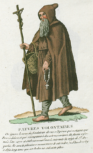 Collection de costumes de tous les ordres monastiques, supprimés à differentes époques, dans la ci-devant Belgique, Bruxelles, Philippe Joseph Maillart et sœur, 1811